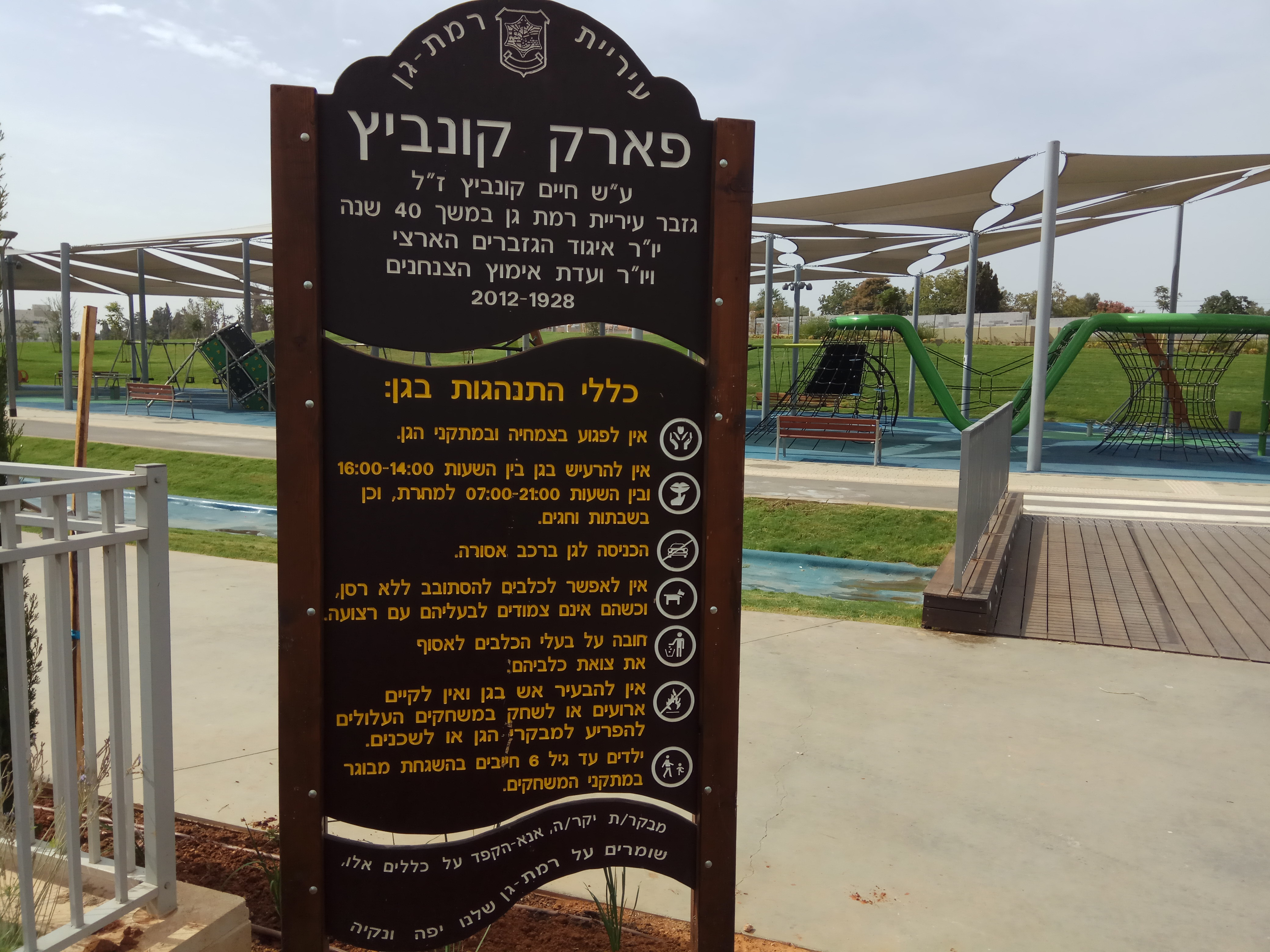 פארק קונביץ בקריניצי החדשה ברמת גן